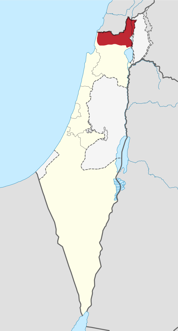 Upper Galilee region